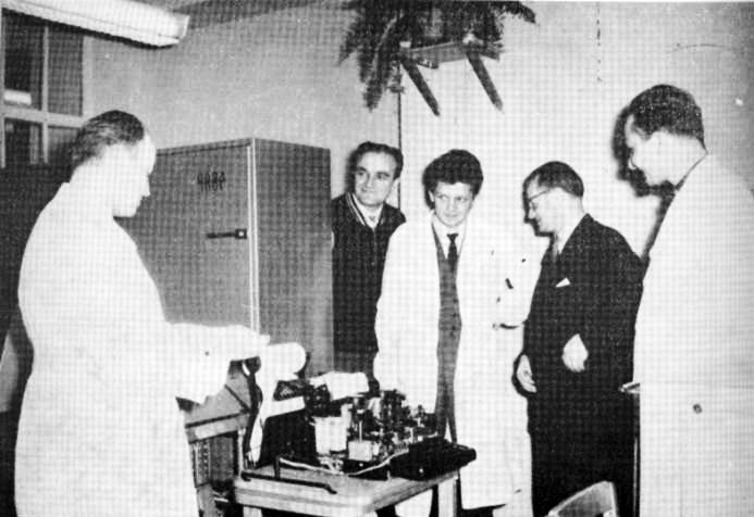 "Projektowaliśmy nasze modele do wprowadzenia ich do produkcji przemysłowej". Odra 1001 i jej czołowi konstruktorzy (w środku pod kwiatem od lewej) inż. Jan Markowski i inż. Andrzej Zasada, po lewej mgr inż. Jan Kunowski